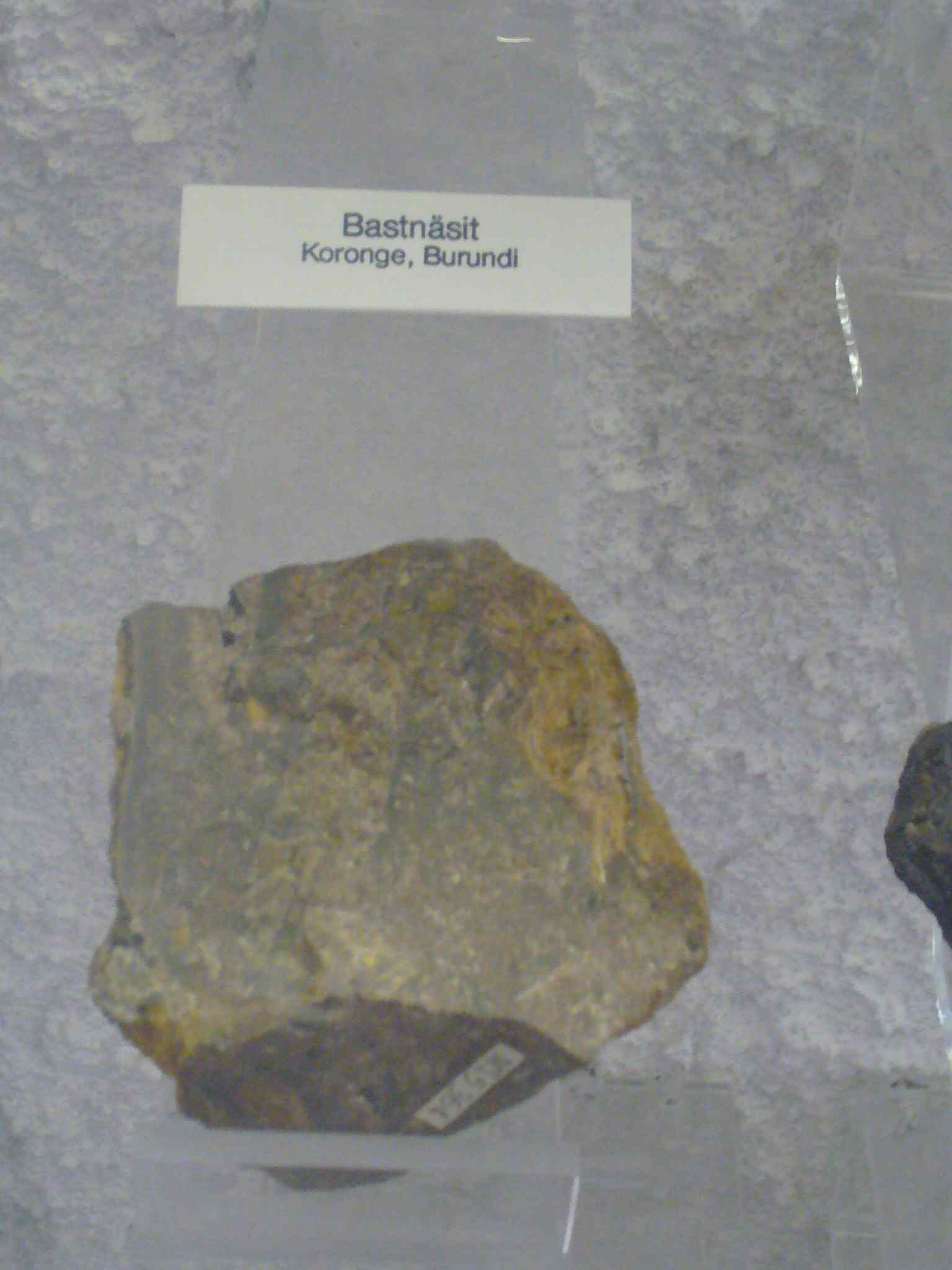 Bastnasite (from Koronge, Burundi).